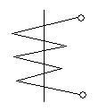 Ustrój elektromagnetyczny - symbol umieszczany na miernikach